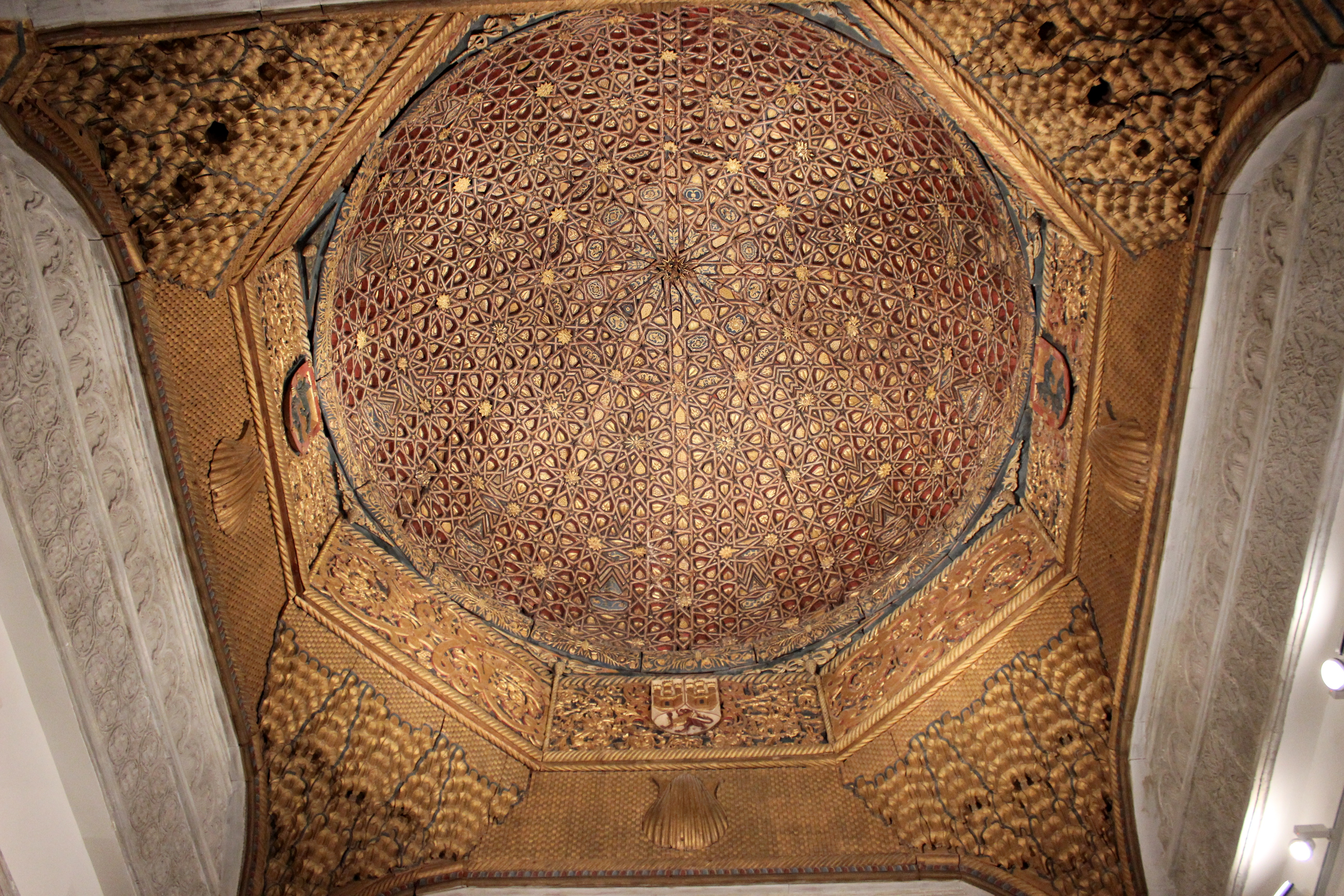 Cúpula procedente del palacio de los Cárdenas en Torrijos.